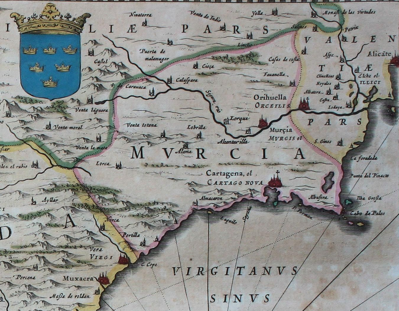 Descripción bibliográfica: Geographia Blaviana. - [Amsterdam : Juan Blaeu, 1659] . - [32], VI, 96 p., 34 f., h. 35a, 35b, 35c, 35d, 36-44 f., 34, [2], 36-40, [2], 43-70 [i. e. 75], [1] f., [20] p. de map., [9] f. de map., [4] f. pleg. de map., [2] f. de plan., [2] f. ge grab. : |bil. ; |cFol. marca major (57 cm.) . - En la dedicatoria a Felipe IV: "Presenta ... El Atlas Universal y Cosmographico de los orbes y terrestre ... Juan Blaeu" . - Título tomado del frontispicio. -- Privilegio fechado en 1659. -Errores de pag. - Sign.: 1, *2, **3, ***-****2, a-e2, A-I2, K1, L-Z2, Aa-Dd2, 4 2, Ee-Ff2, A-I2, K1, L2, M1, N-Y2, Z5, Aa-Dd2, Ee1, A-D2, E-F1, G-I2, K-L1, M-O2, P1, Q-Z2, Aa-Bb2, Cc1, Dd3, Ff-Zz2, Aaa-Bbb2, . - Frontispicio grab. col. -- Incluye un total de 49 il. entre map., plan. i grab. Materia: Atlas - Obras anteriores a 1800 Impresor: Blaeu, Joan, 1596-1673, imp. Lugar de impresión: Holanda. Amsterdam Localización: Vea la ilustración en su contexto Visite también la exposición "Cartografía histórica en la Biblioteca de la Universidad de Sevilla"